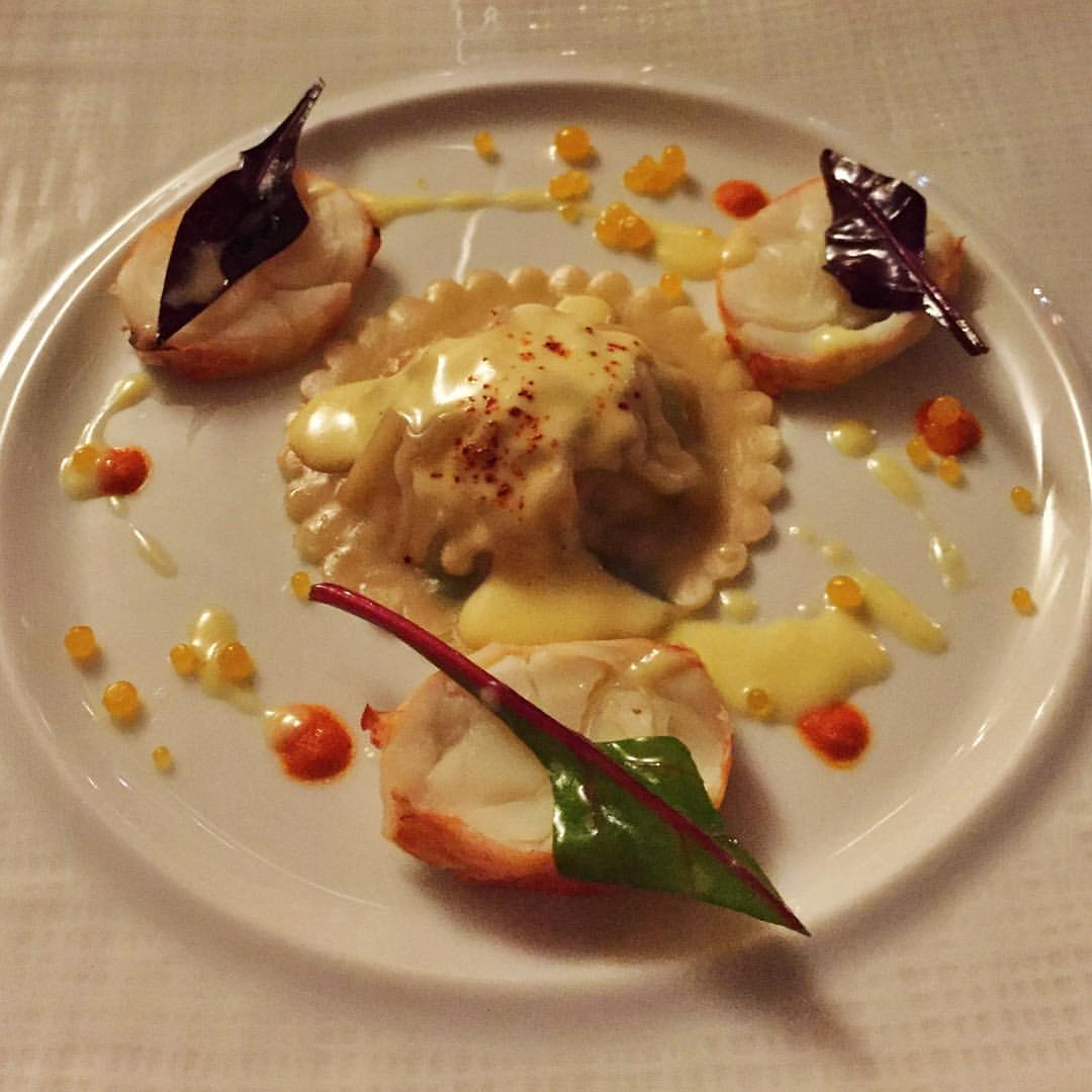 Eu já comi duas vezes o ravioli de frutos do mar que é um prato-assinatura do Gordon Ramsay at Royal Hospital Road, mas esse ravioli de caranguejo com fatias de lagosta e emulsão de manteiga foi uma das coisas mais deliciosas que eu comi nos últimos tempo